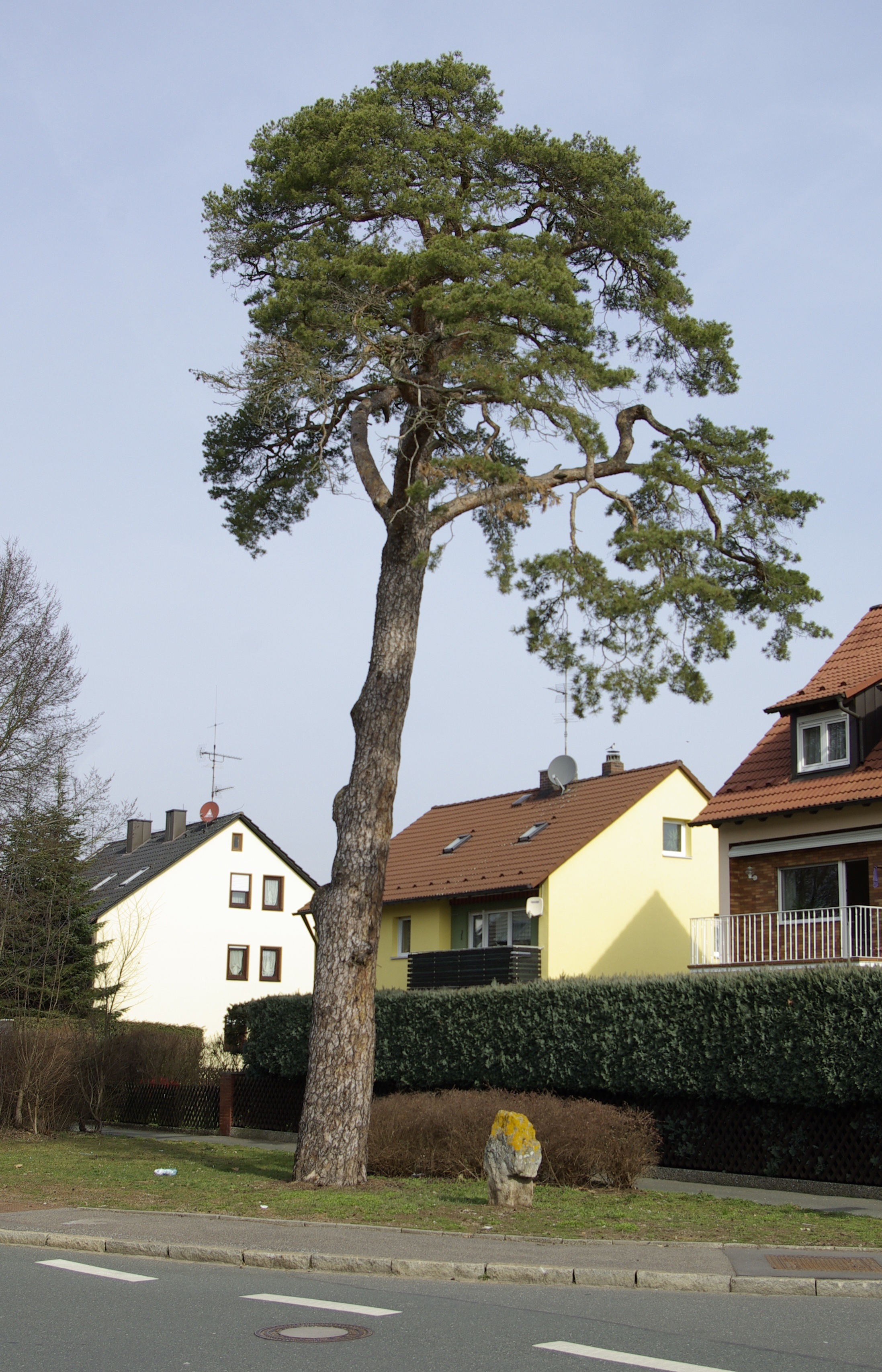 Die am 29. August 2013 gefällte Stadelner Kiefer und das Steinkreuz an der Ecke Theodor-Heuss-Straße / Alfred-Nobel-Straße im Fürther Stadtteil Stadeln.